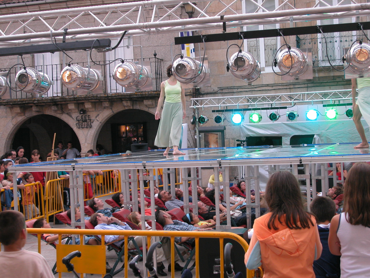 MIT de Ribadavia, Ourense, Galicia, Spain. Representación na rúa na praza maior.